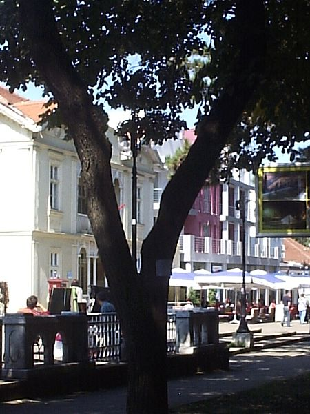 Аутор: Саша Костић Врњачка бања